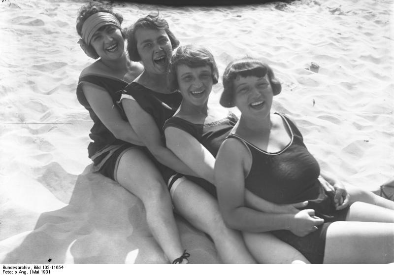 Die ersten Badegäste im Strandbad Wannsee b/Berlin! Lustige Baderatten erholen sich in den ersten warmen Sonnenstrahlen.